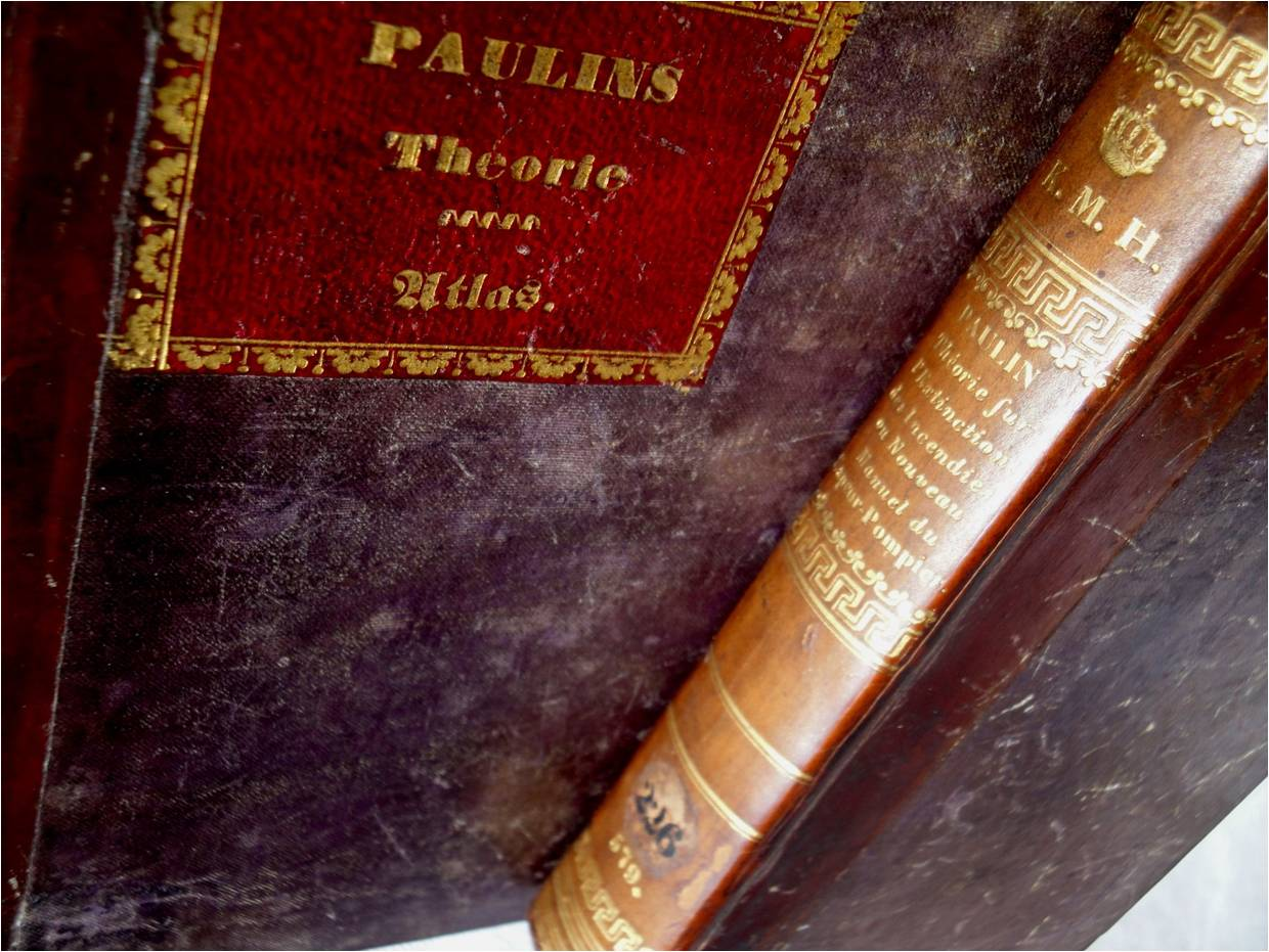 ouvrages théoriques sur les incendies écrits par Gustave Paulin